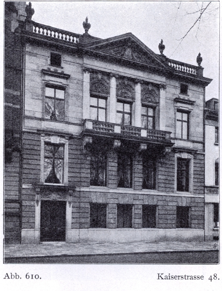 Wohnhaus Kaiserstraße 48 in Düsseldorf, erbaut durch die Berliner Architekten Kayser & von Grossheim